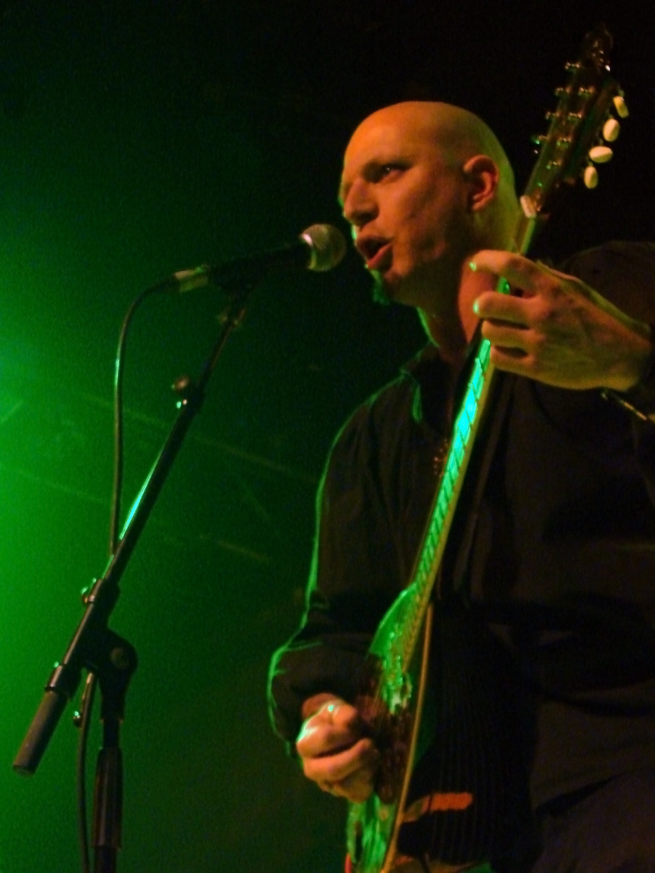 Stille Volk au Cernunnos Fest 07, le 16/12/07 à la Locomotive, Paris. Stille Volk est un groupe néo-médiéval folk originaire des Pyrénées.